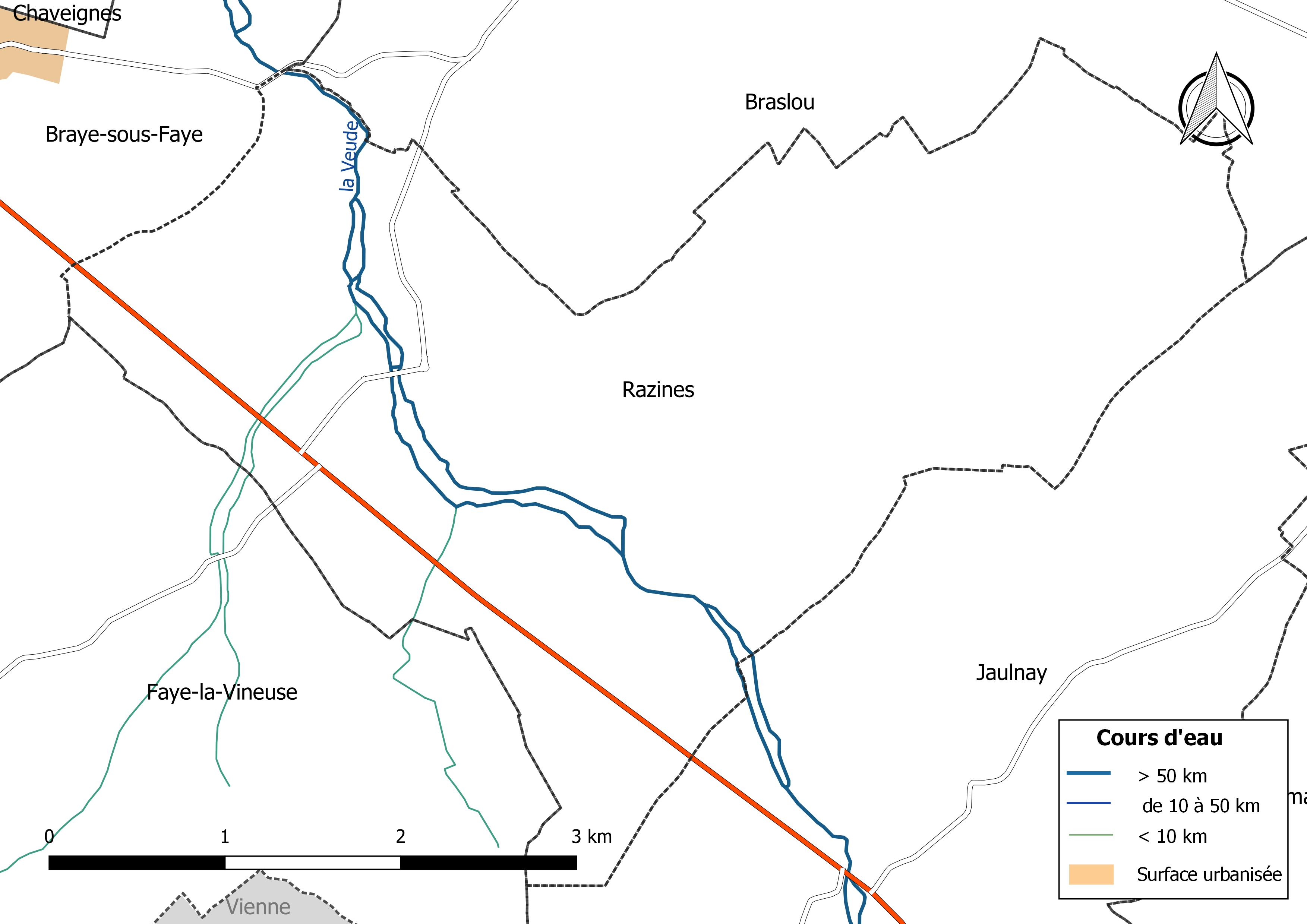 Carte du réseau hydrographique de la commune de Razines (France).